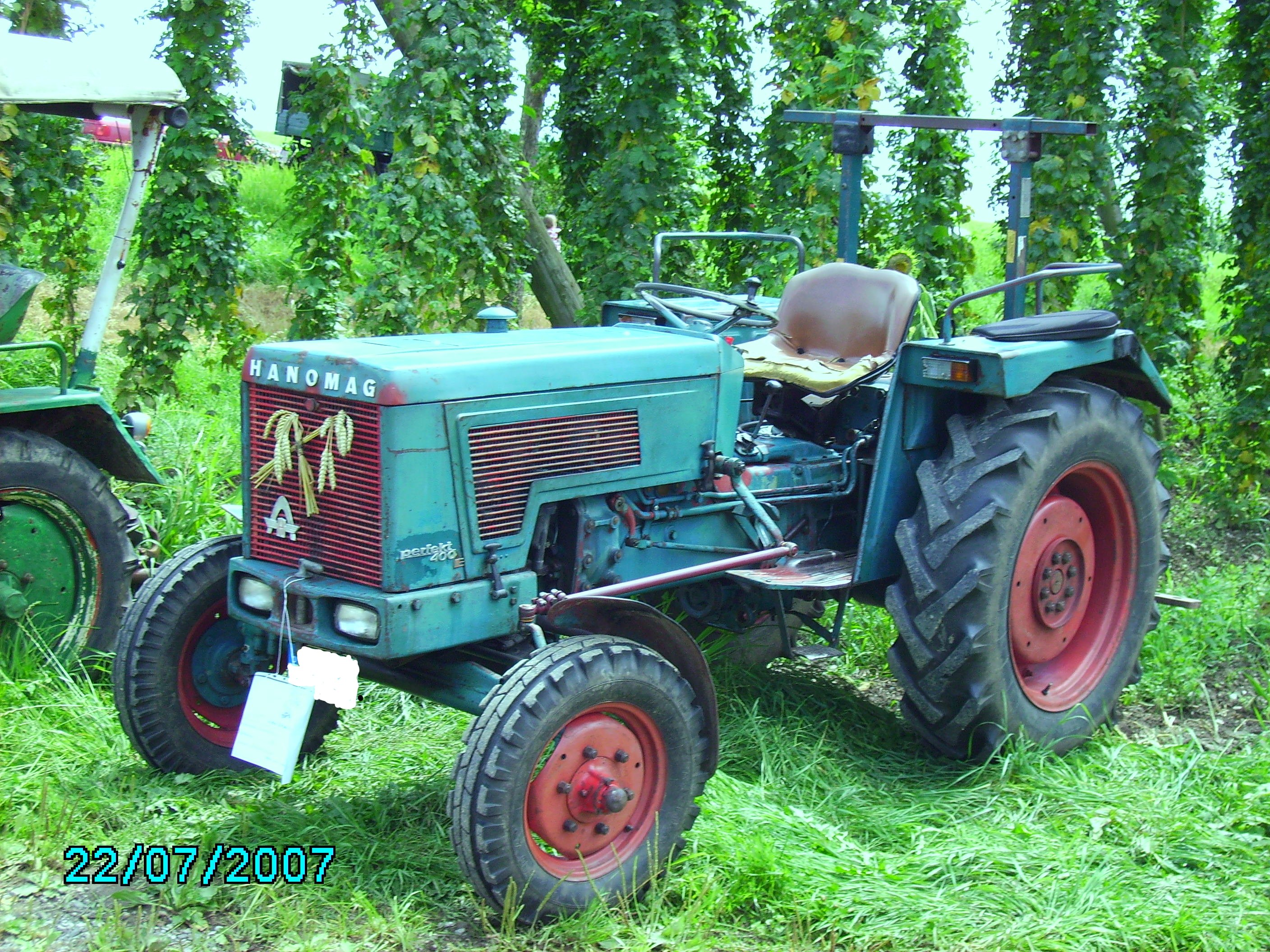 Hanomag Perfekt 400 E (401 E)